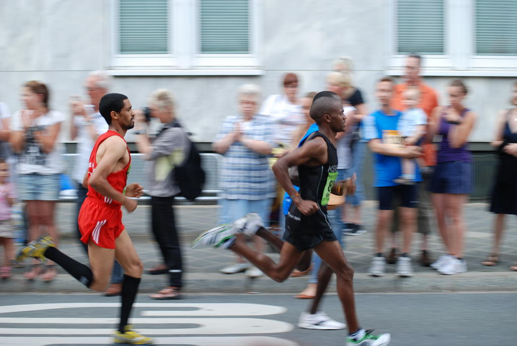 MLP Marathon 2011, Spitzengruppe direkt nach dem Start